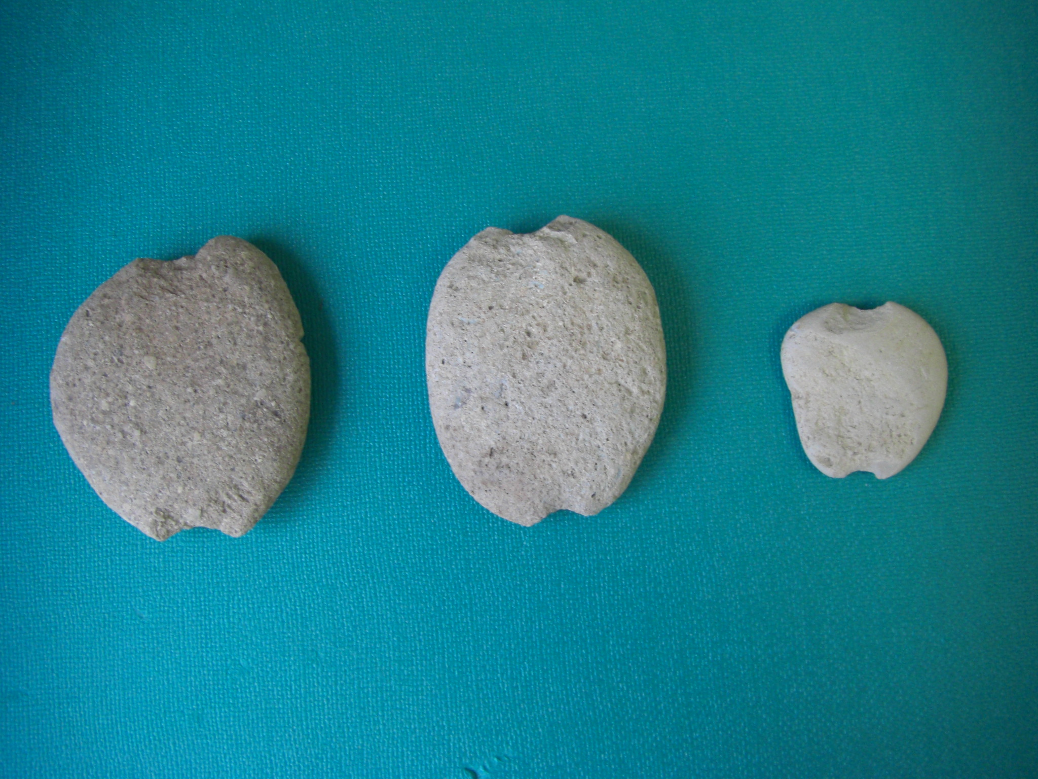 石錘（秋田県能代市二ツ井町）